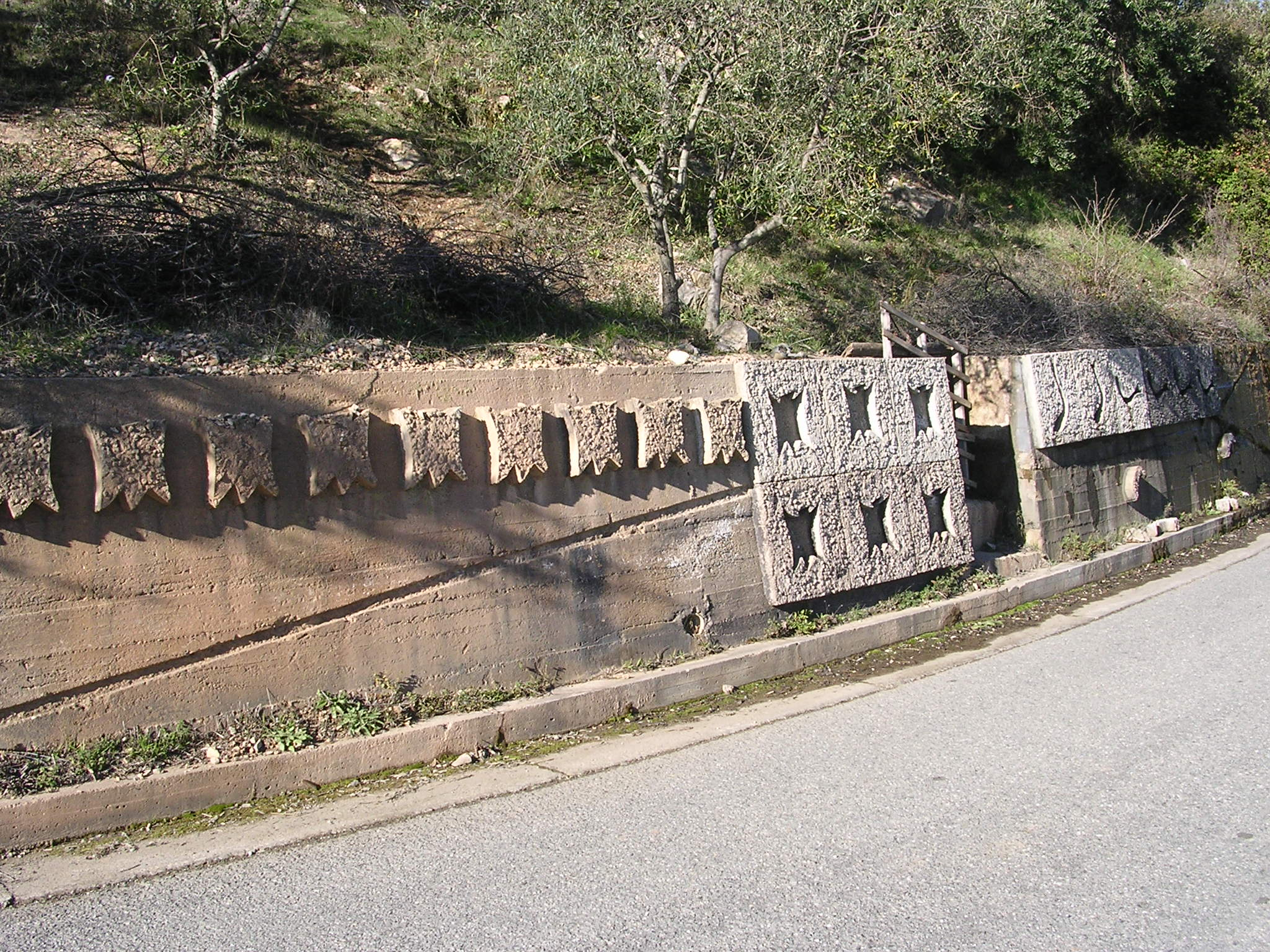 Particolare dell'opera "la strada del rito"